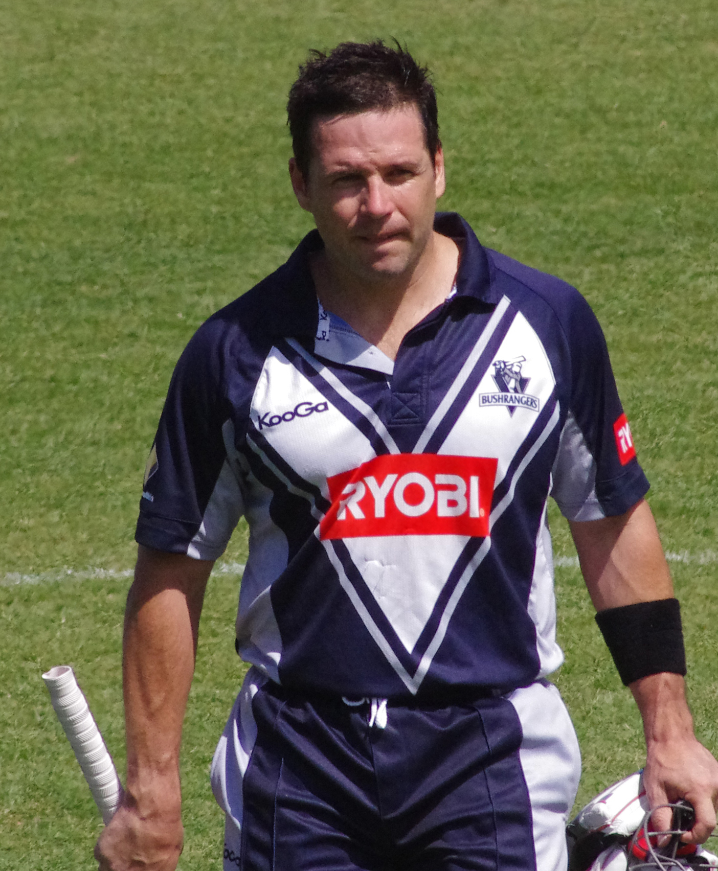 Brad hodge